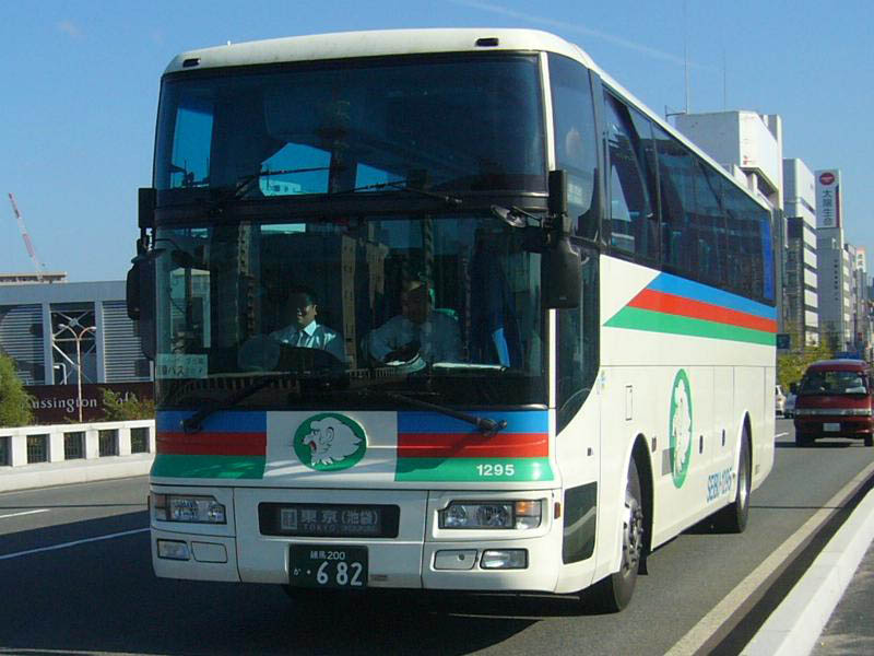 登録番号：練馬200か・682 西武バス(Seibu bus)練馬営業所所属 高速用車両（各系統で共通運用） 日産ディーゼル・スペースウィング KL-RA552RBN